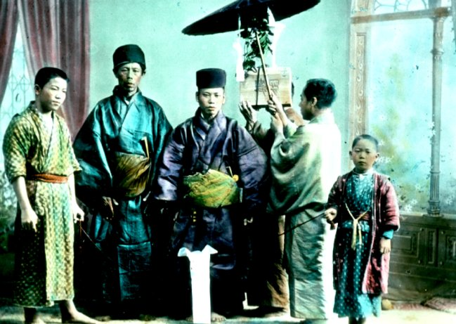 Ryukyuan Bridegroom on Wedding Hobby-horse